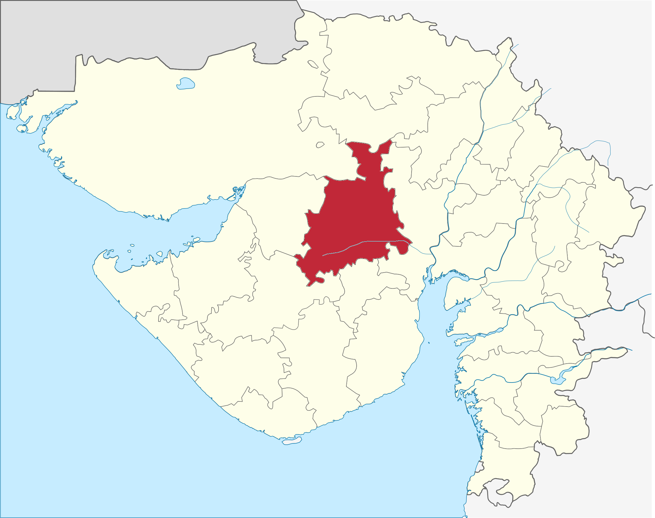 Distrito de Surendenagar en Gujarat